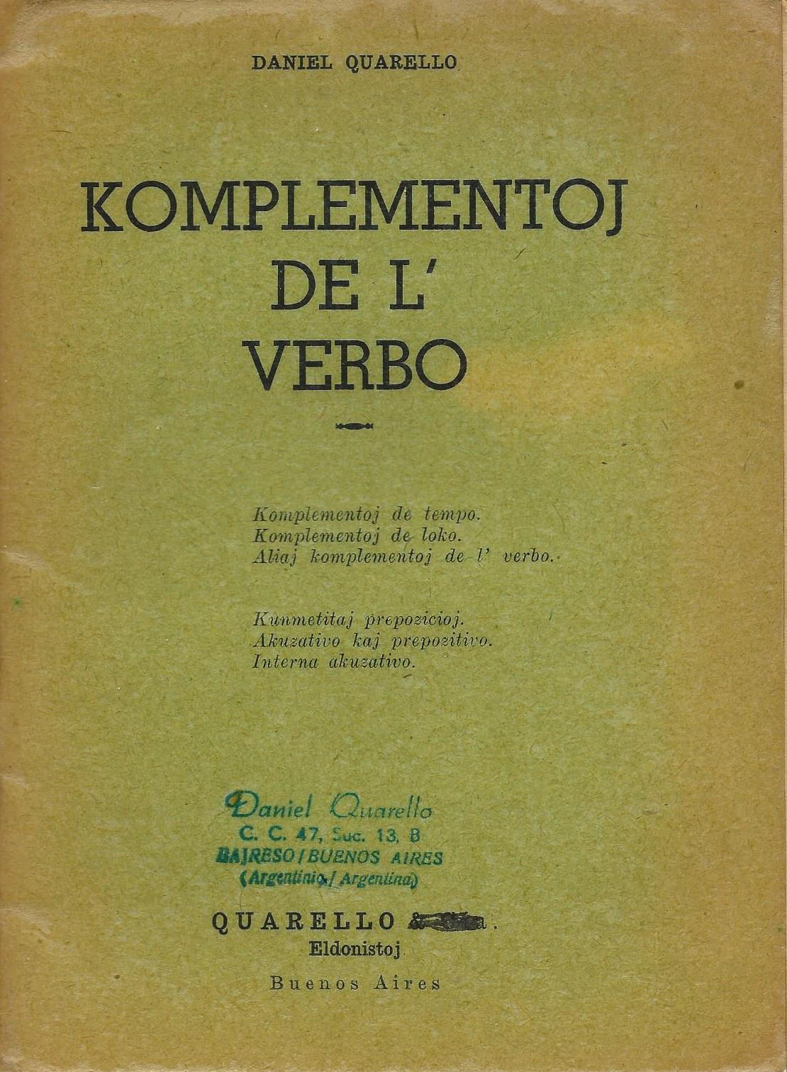 librokovrilo de "Komplementoj de l' Verbo", 1947